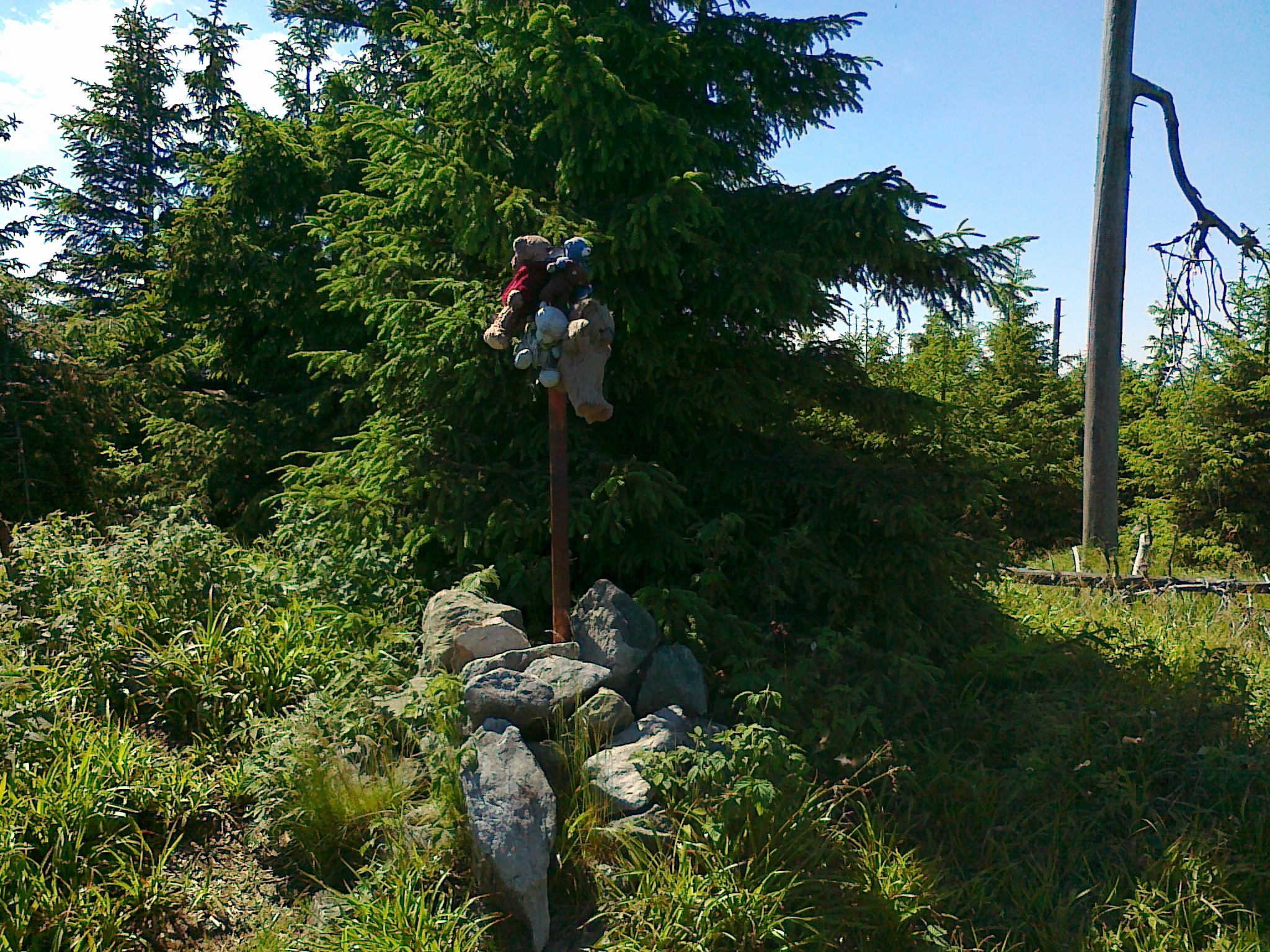 Widok na punkt geodezyjny na górze Medvědí vrch - 1216 m